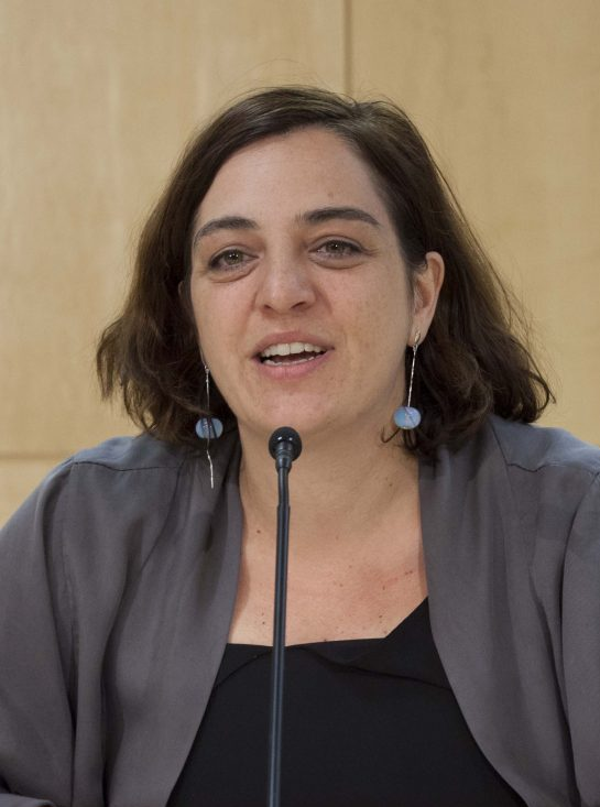 El Ayuntamiento de Madrid crea la nueva Área de Políticas de Género y Diversidad, cuya estructura y decreto de competencias se ha aprobado hoy, jueves 30 de marzo, en la Junta de Gobierno. Estará compuesta de una coordinación general y dos direcciones generales con sus dos subdirecciones. La prioridad del área será la elaboración de un plan de choque contra las violencias.